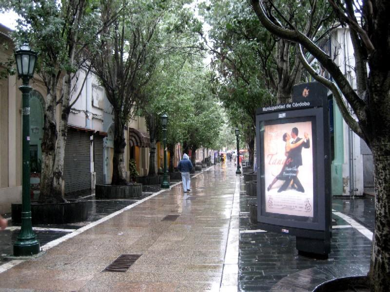 prueba